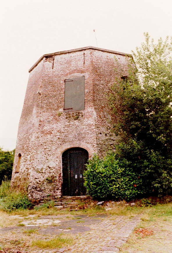 Maldegem Stationsstraat 47